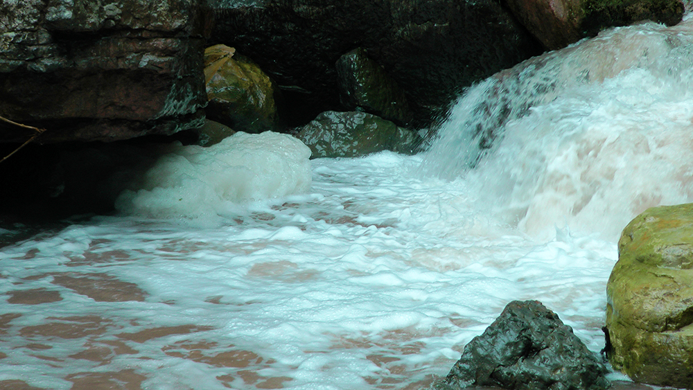 Río Cachiyacu de Santa Ana